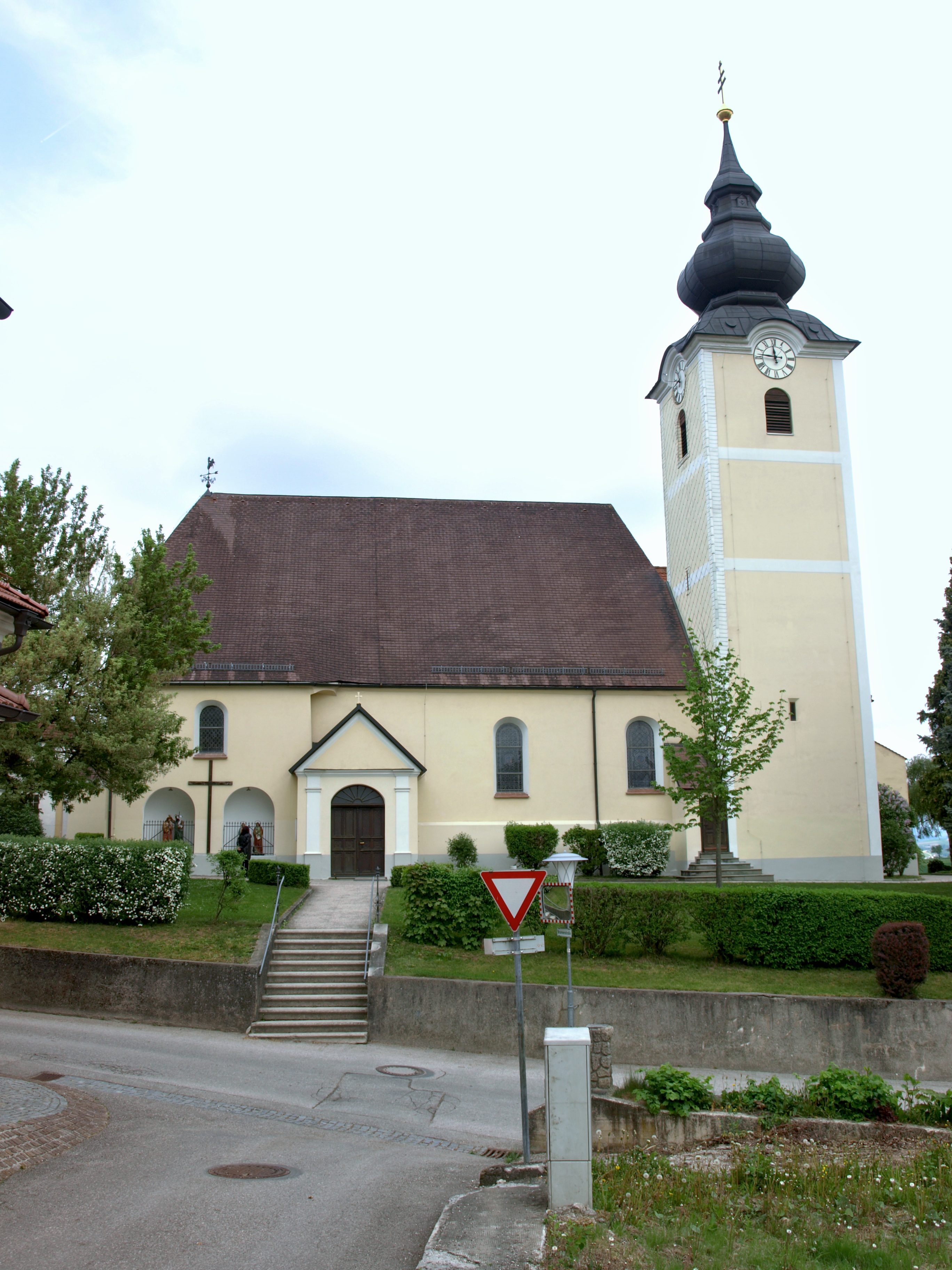 Kath. Pfarrkirche hl. Johannes der Täufer